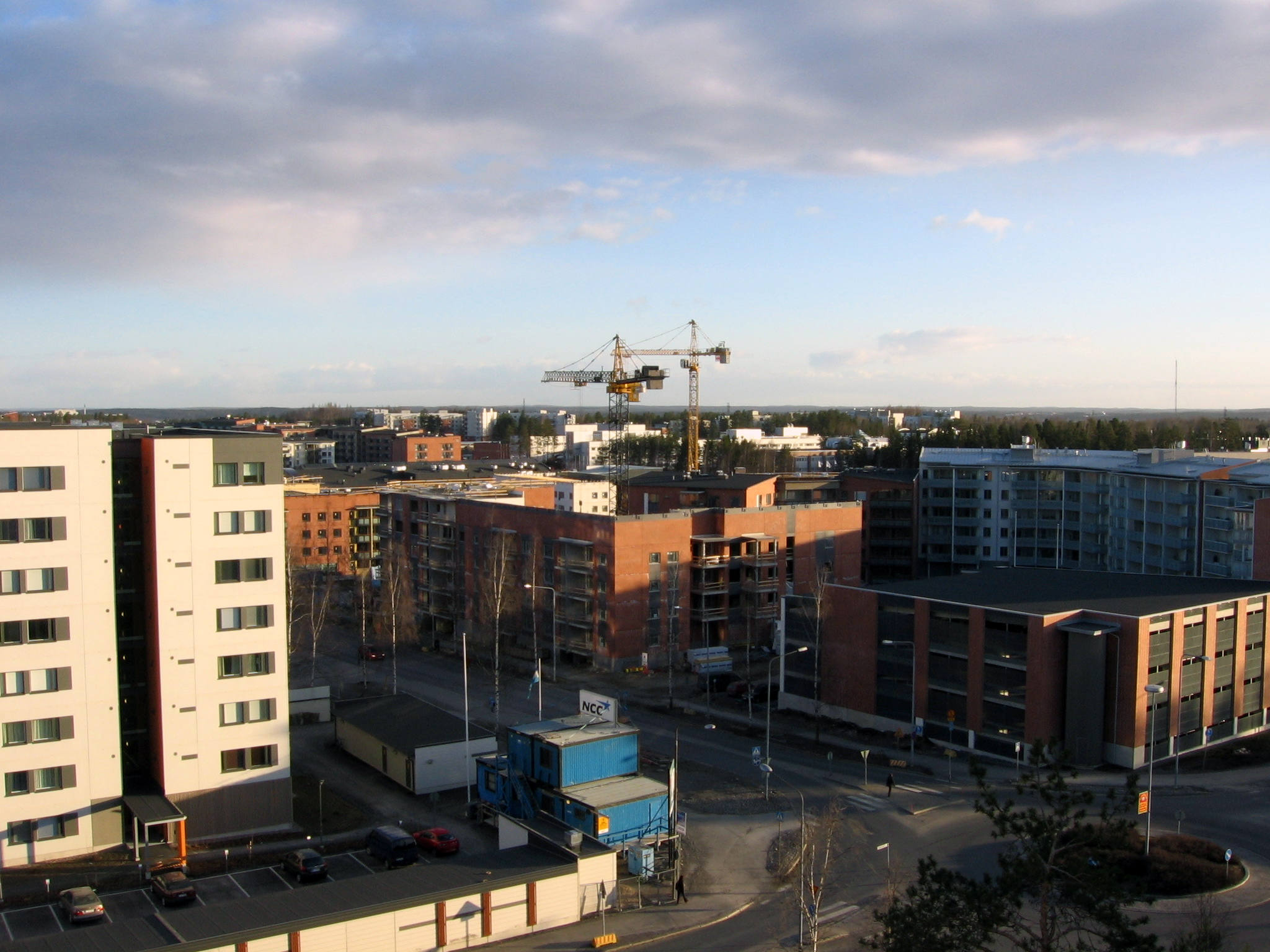 Hervanta_3.jpg